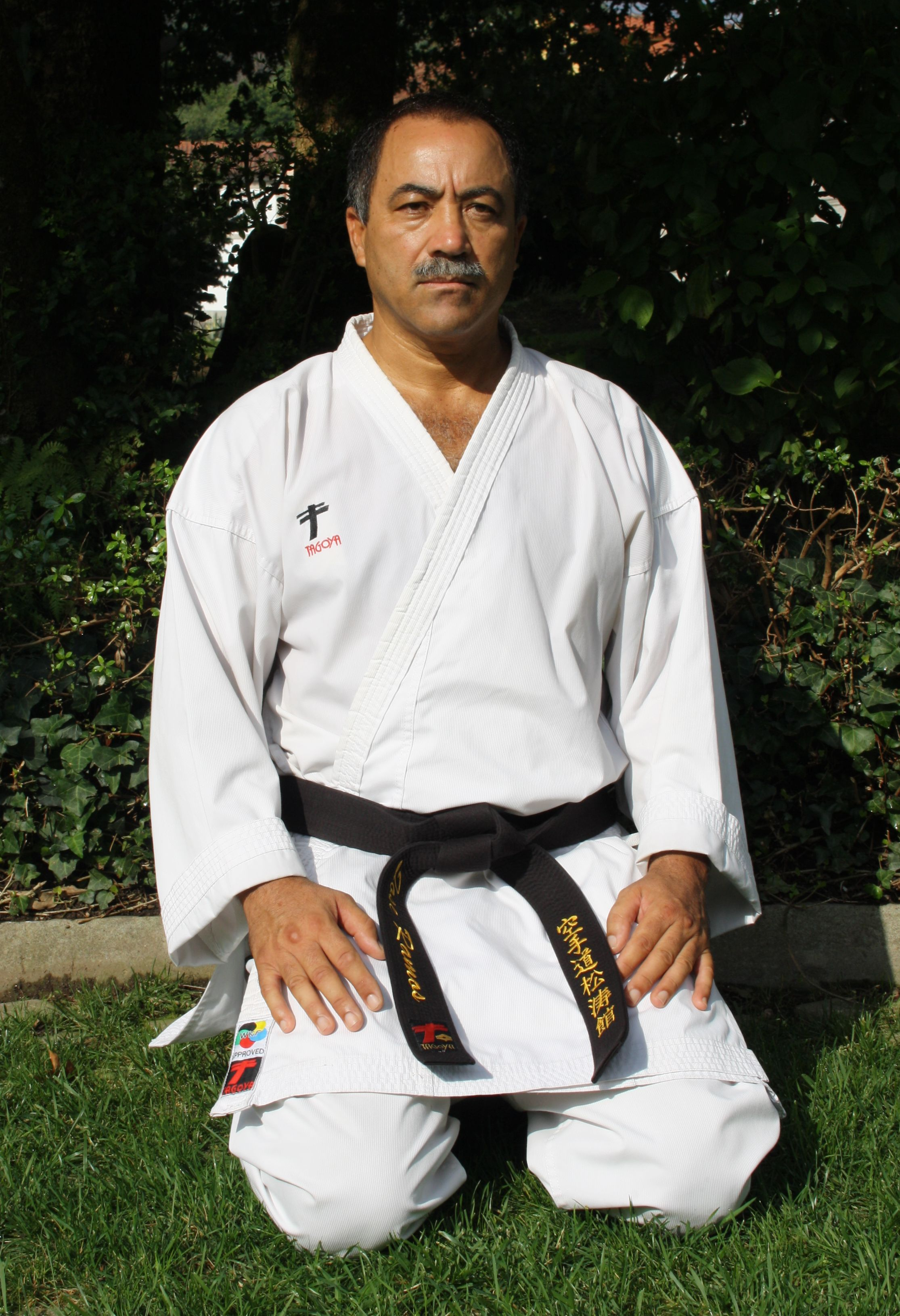 Senei José Ramos, Vieira do Minho 2012.